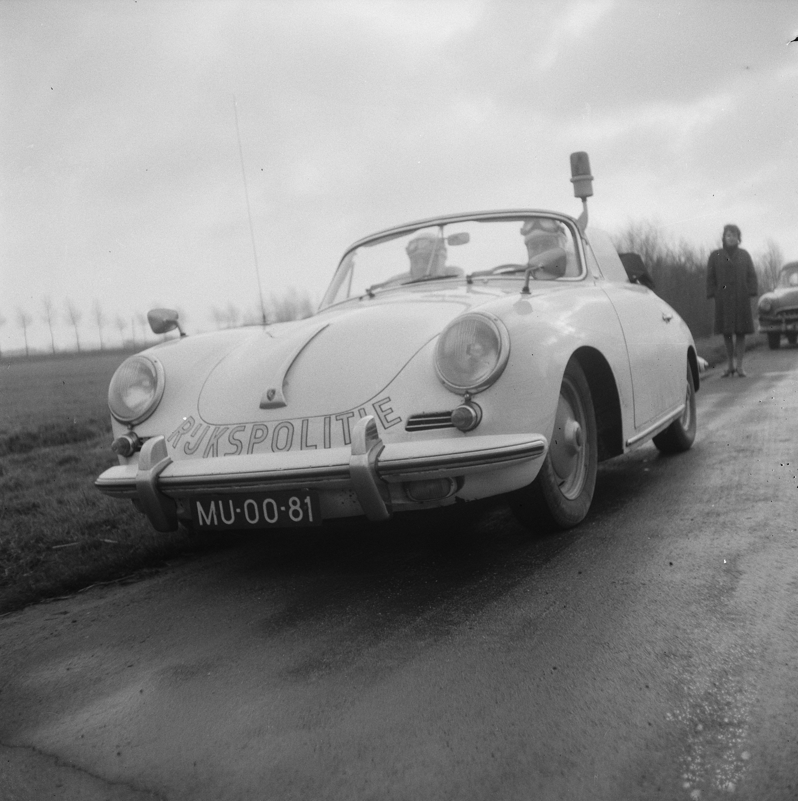 Collectie / Archief : Fotocollectie Anefo Reportage / Serie : [ onbekend ] Beschrijving : Een Porsche 356 cabriolet van de Rijkspolitie voor patrouillewerk op de snelwegen in het land Datum : 21 december 1964 Trefwoorden : auto's, politie, verkeer Instellingsnaam : Porsche, Rijkspolitie Fotograaf : Evers, Joost / Anefo Auteursrechthebbende : Nationaal Archief Materiaalsoort : Negatief (zwart/wit) Nummer archiefinventaris : bekijk toegang 2.24.01.03 Bestanddeelnummer : 917-2684